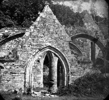 La Roche-Maurice : ruines de la chapelle de Pont-Christ.